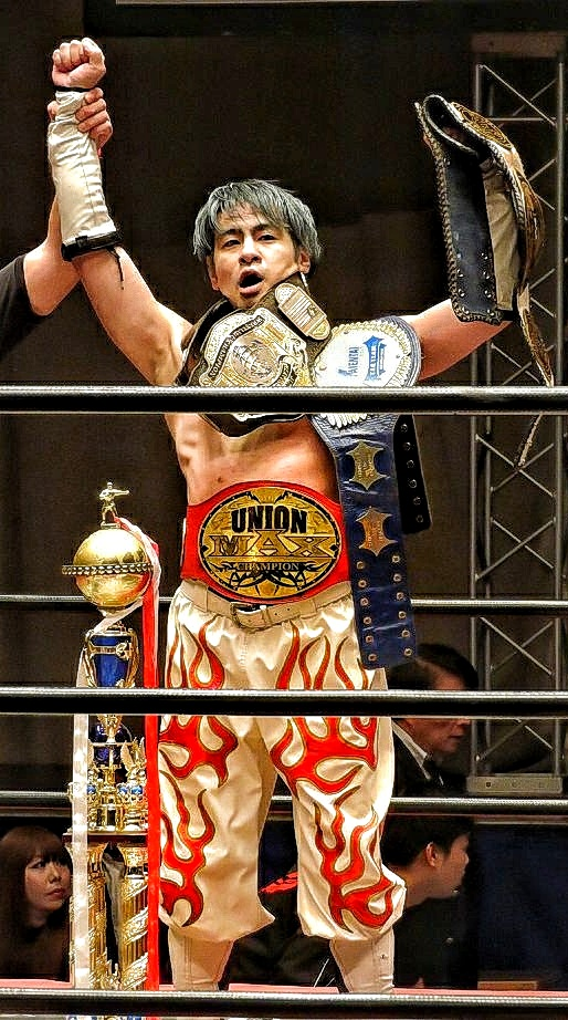 プロレスラーの木高イサミ選手